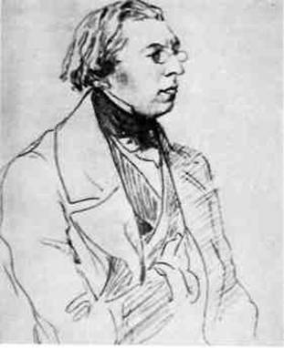 Портрет И. С. Аксакова работы Э. А. Дмитриева-Мамонова